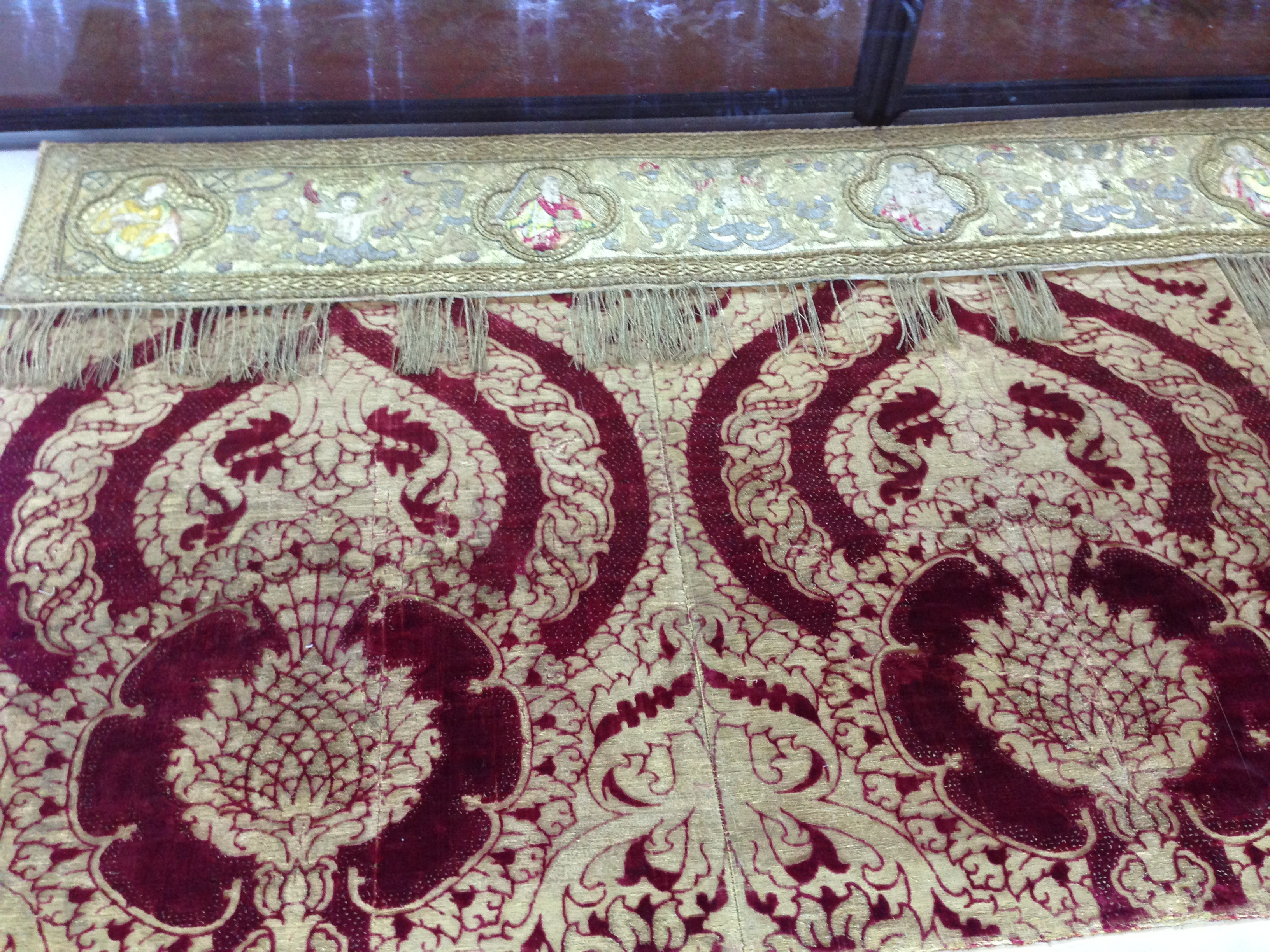 Paliotto d'altare. Museo del tessile e del costume. Spoleto